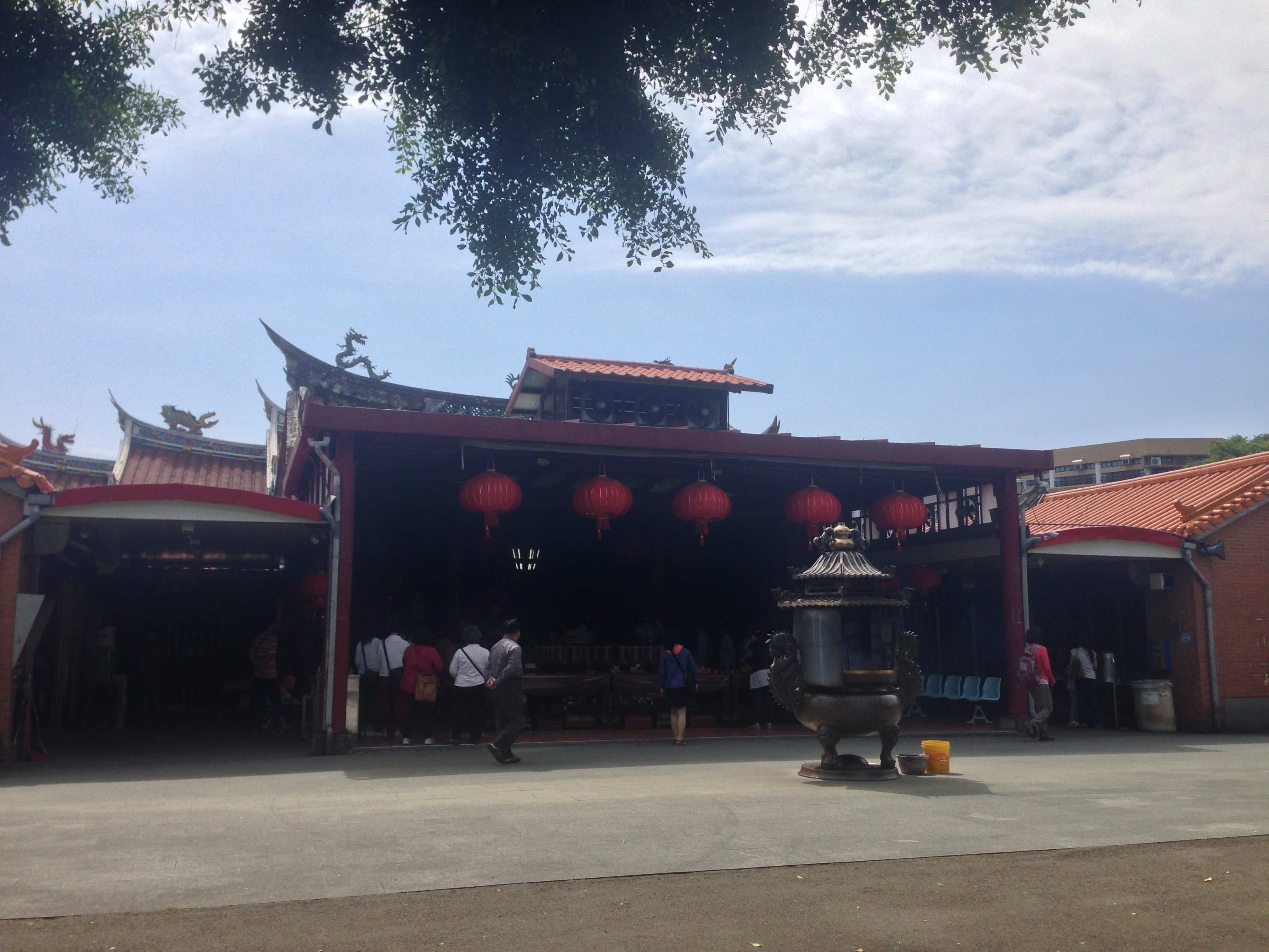 中文（台灣）: 新竹金山寺廟埕